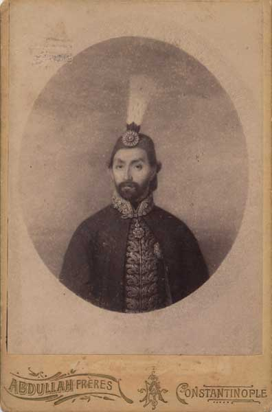 Abdülmecit'in fotoğrafı çok önemli, Abdullah Biraderler